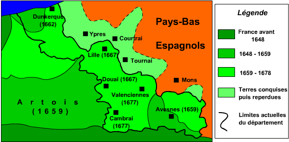 Carte du nord de la France au temps de Louis XIV Utilisateur:Manchot sanguinaire